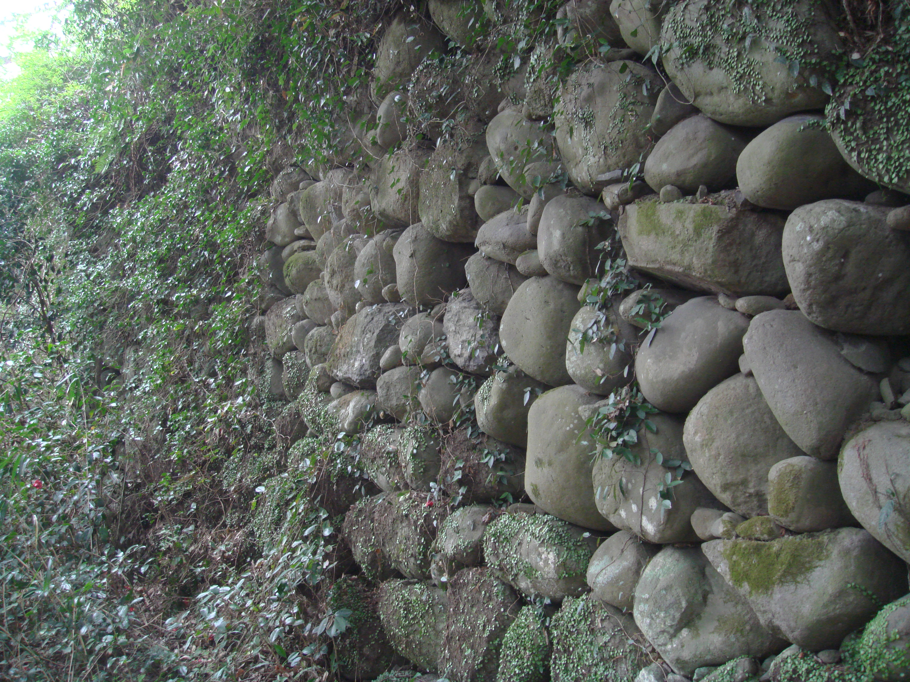 大分県日田市にあった、永山城本丸の石垣の一部。